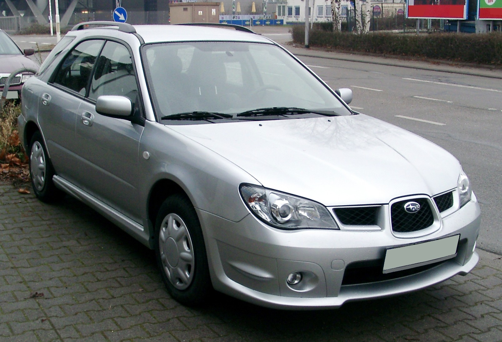 Subaru Impreza, 2. Generation